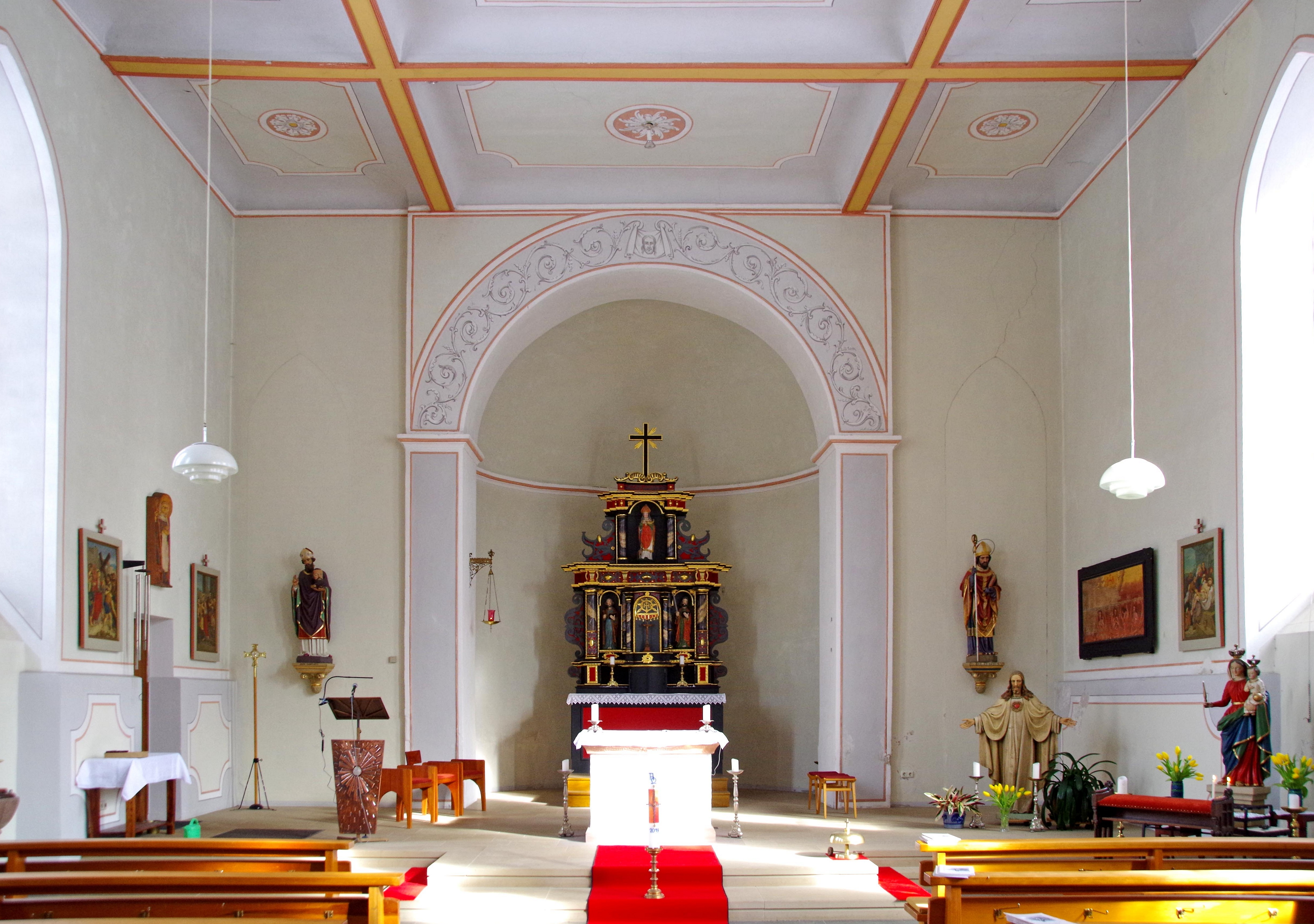 St. Dionysius (Gondenbrett), östlicher Innenraum mit Altar